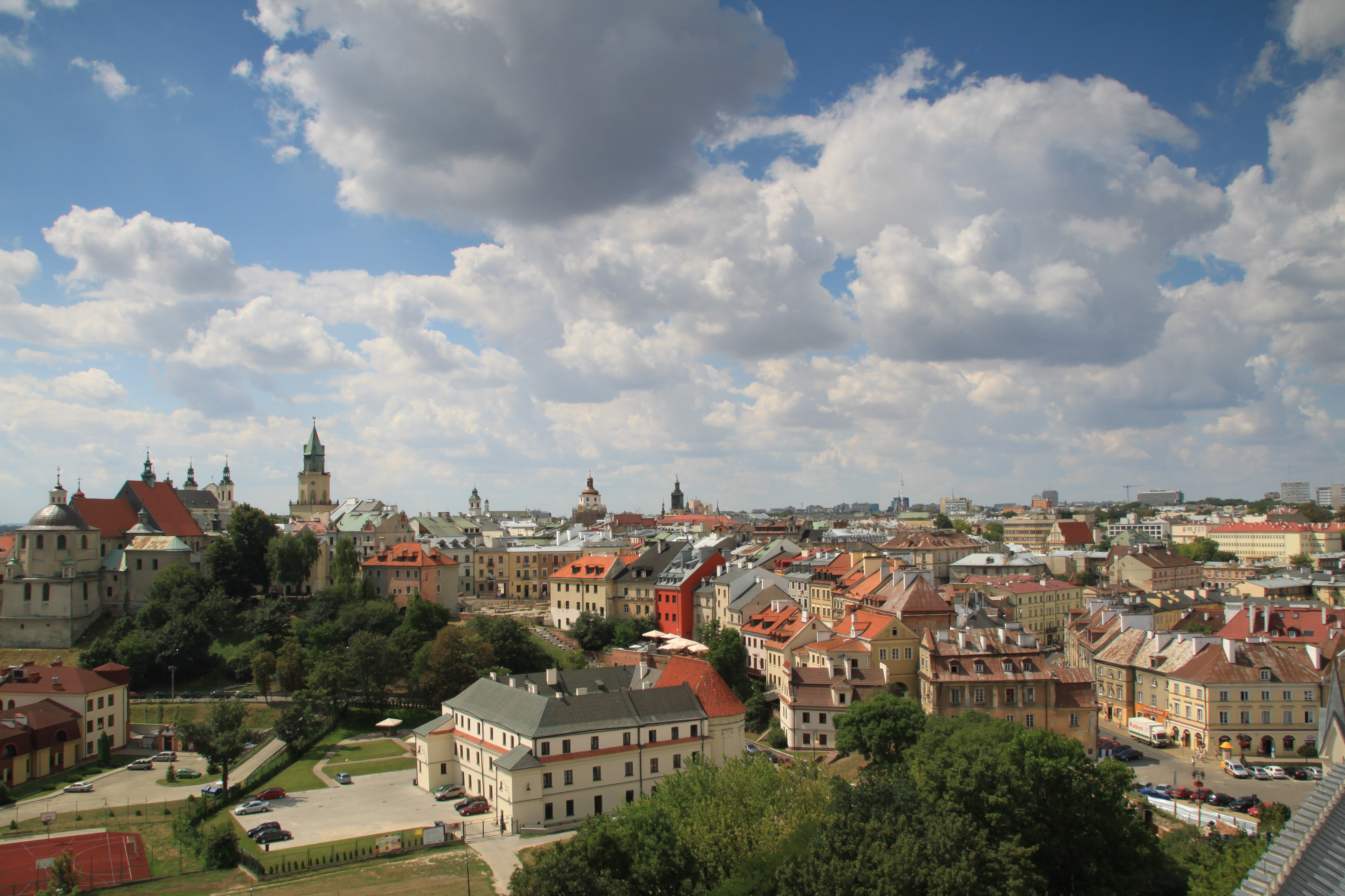 Lublin, układ urbanistyczny Starego Miatra i śródmieścia